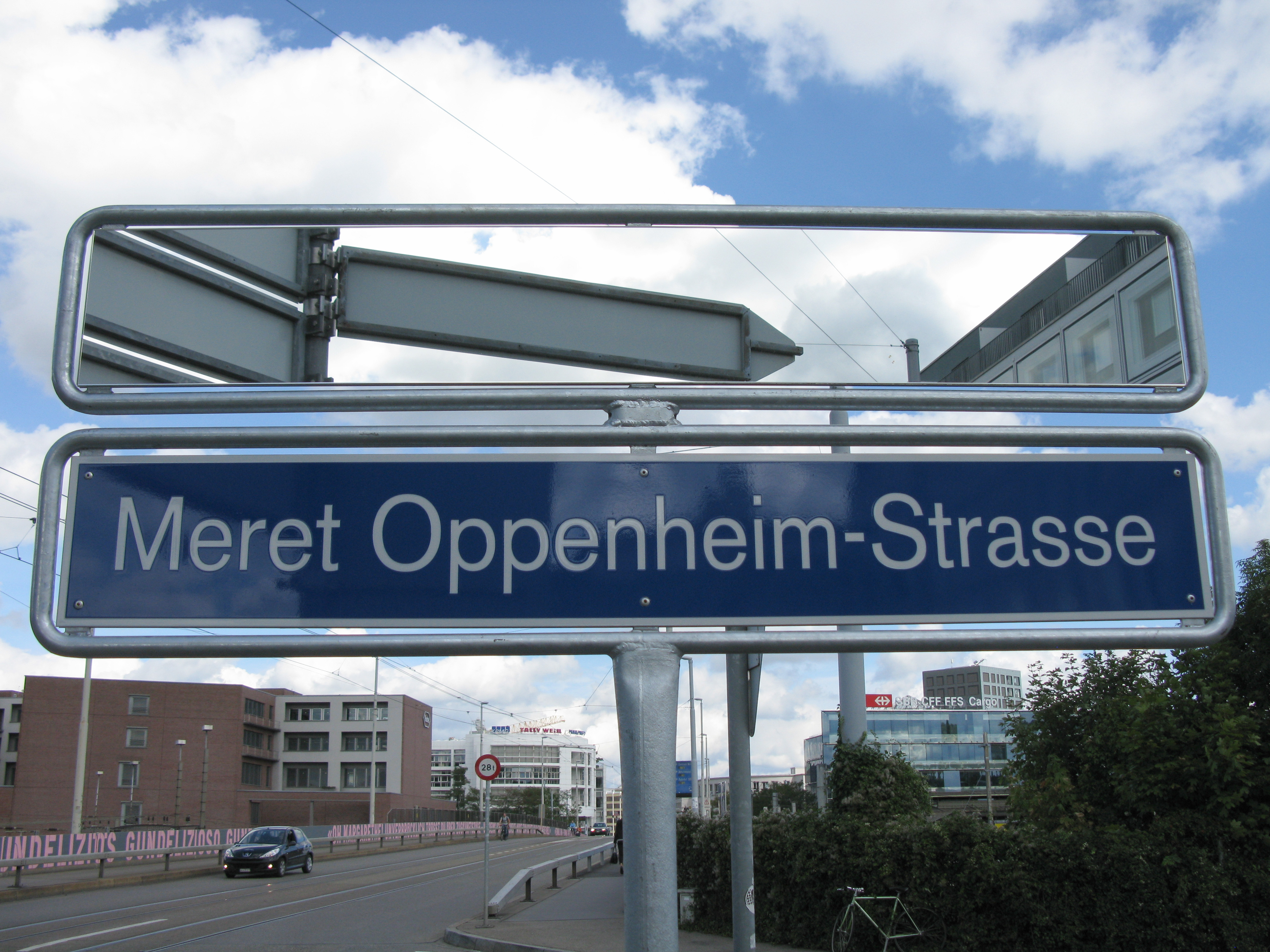 Straßenschild an der Einmündung der Meret Oppenheim-Strasse in die Margarethenstrasse in Basel, der Spiegel ist vermutlich eine Verfremdung eines Kunstwerkes von Peter Suter anlässlich des 100. Geburtstages von Meret Oppenheim